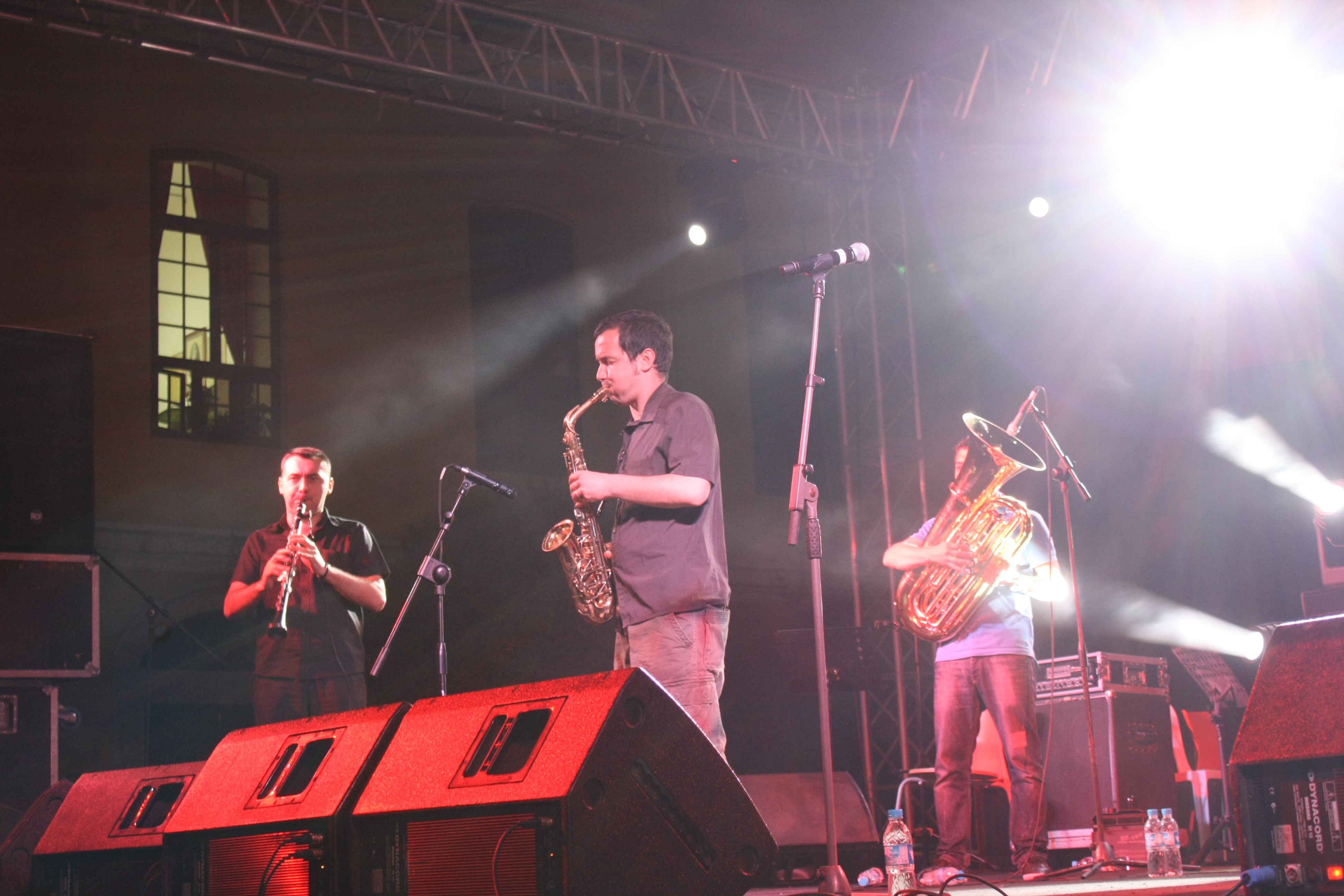 Galatasaray Lisesi Kültür ve Sanat Festivali-Kolektif İstanbul Konseri